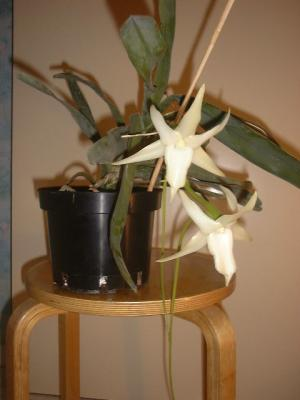 Description : Angraecum sesquipedale